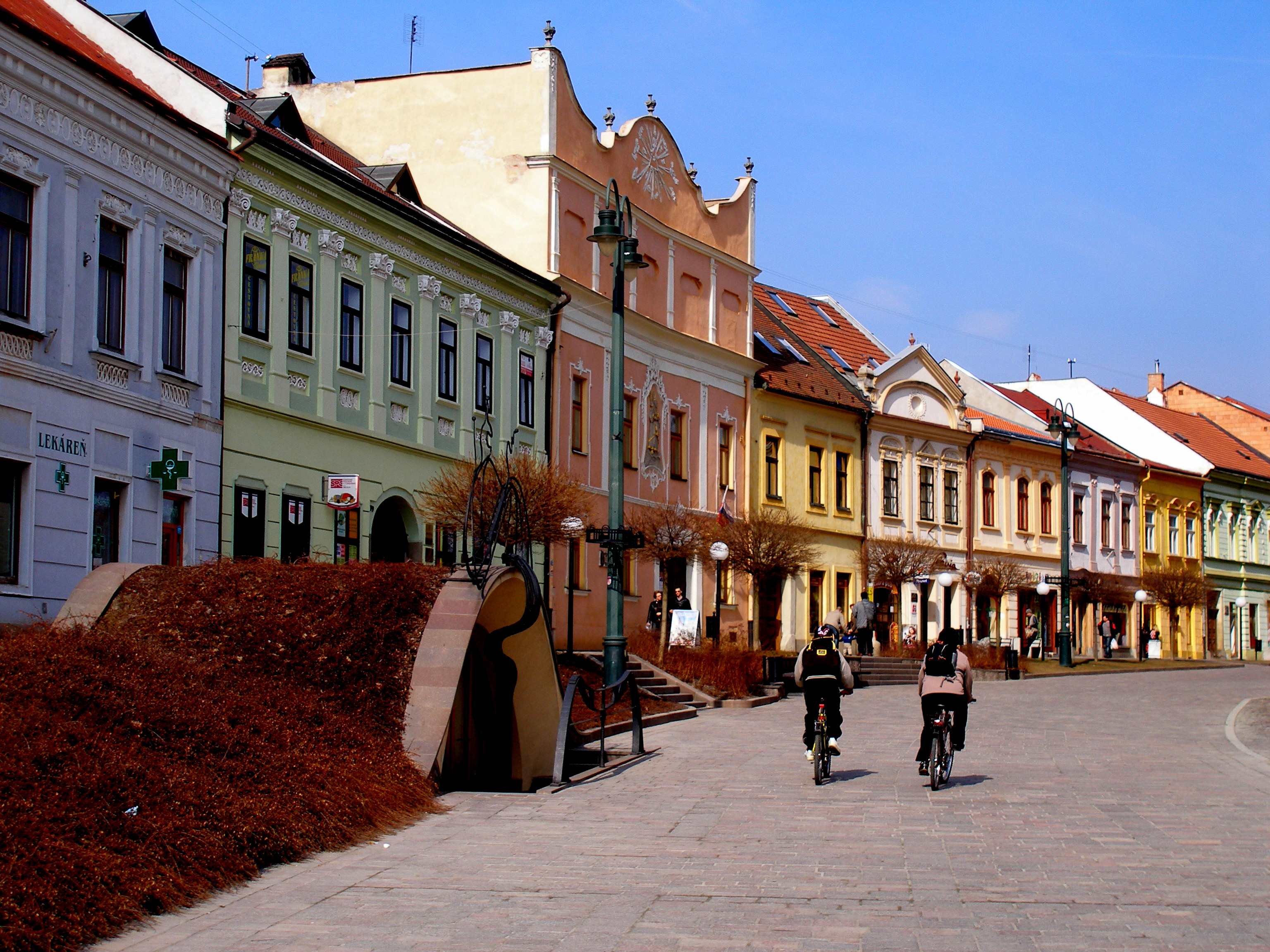 Meštianske domy mesto Prešov